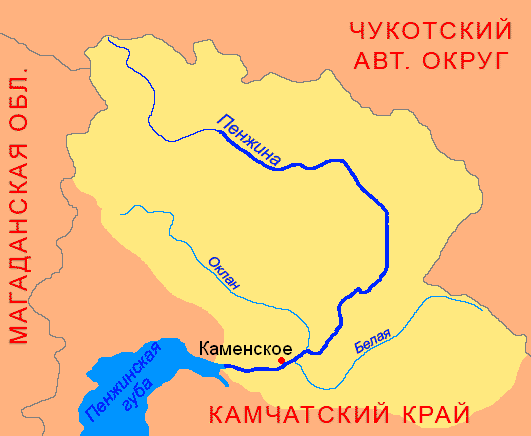 Схема бассейна реки Пенжина